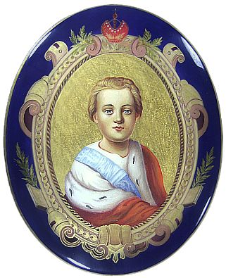 Tsar Ivan VI